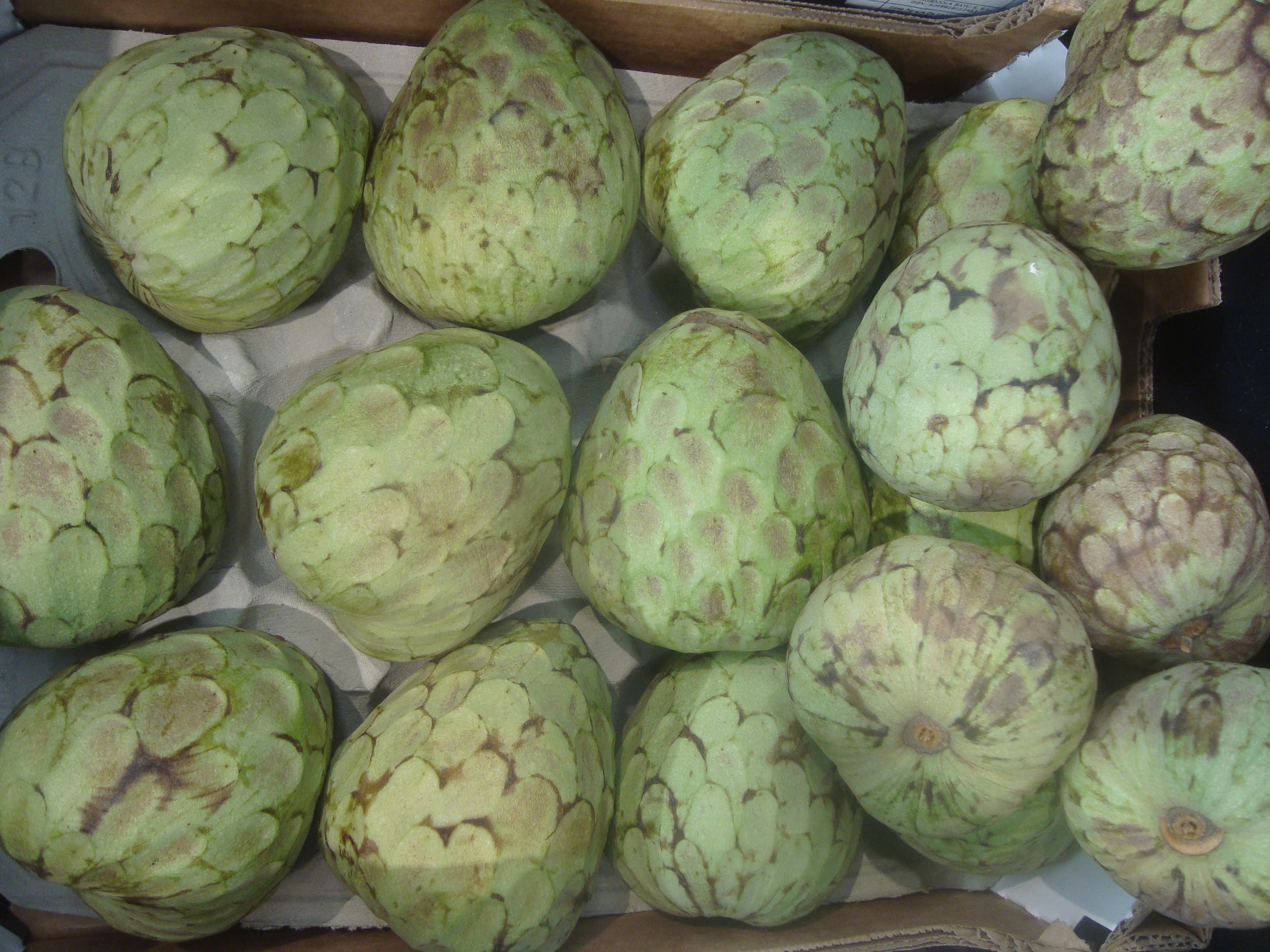 Chirimoya (Annona Cherimola Mill). Fruta.